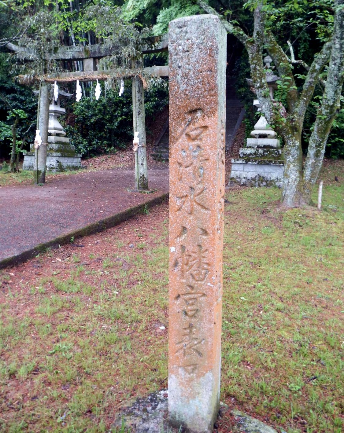 伊豫一社 五十七番 石清水八幡宮 表口石碑